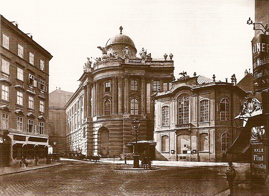 Das alte Wiener Burgtheater am Michaelerplatz nebst Winterreitschule (rechts)